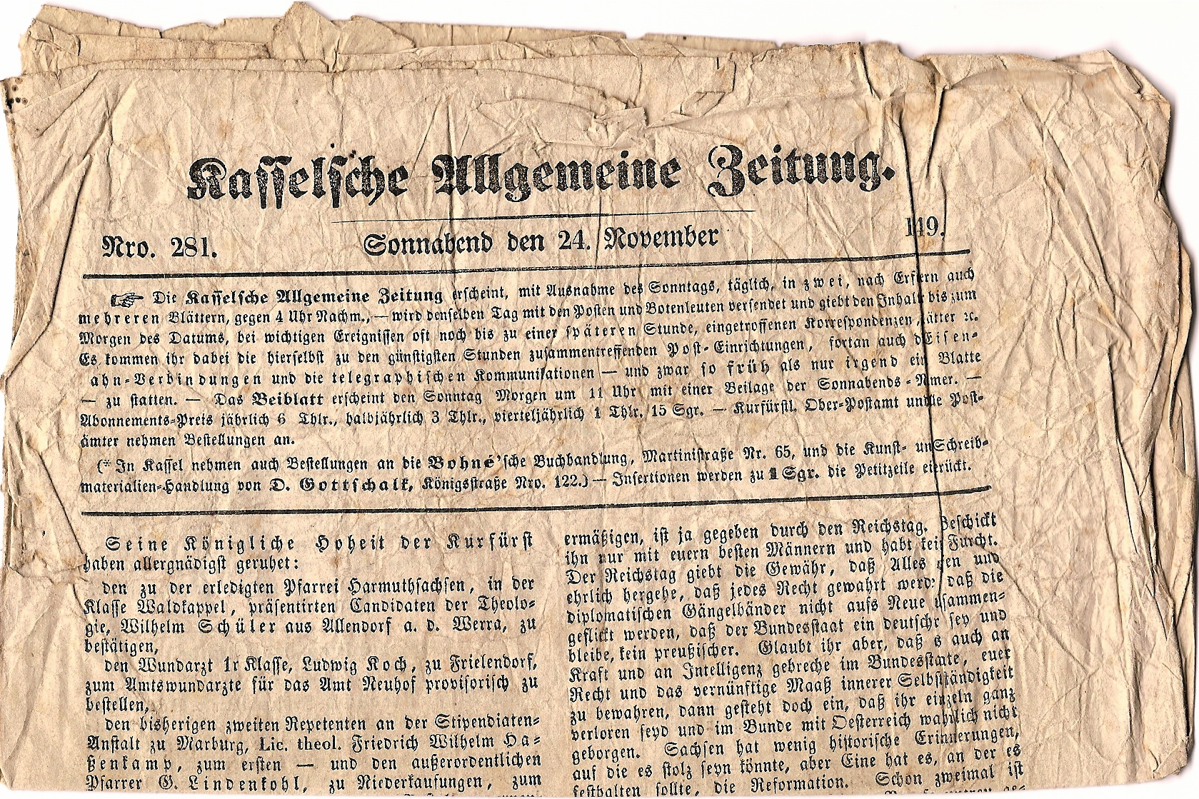 Ausgabe der Zeitschrift Kasselschen Allgemeinen Zeitung vom 24. November 1849